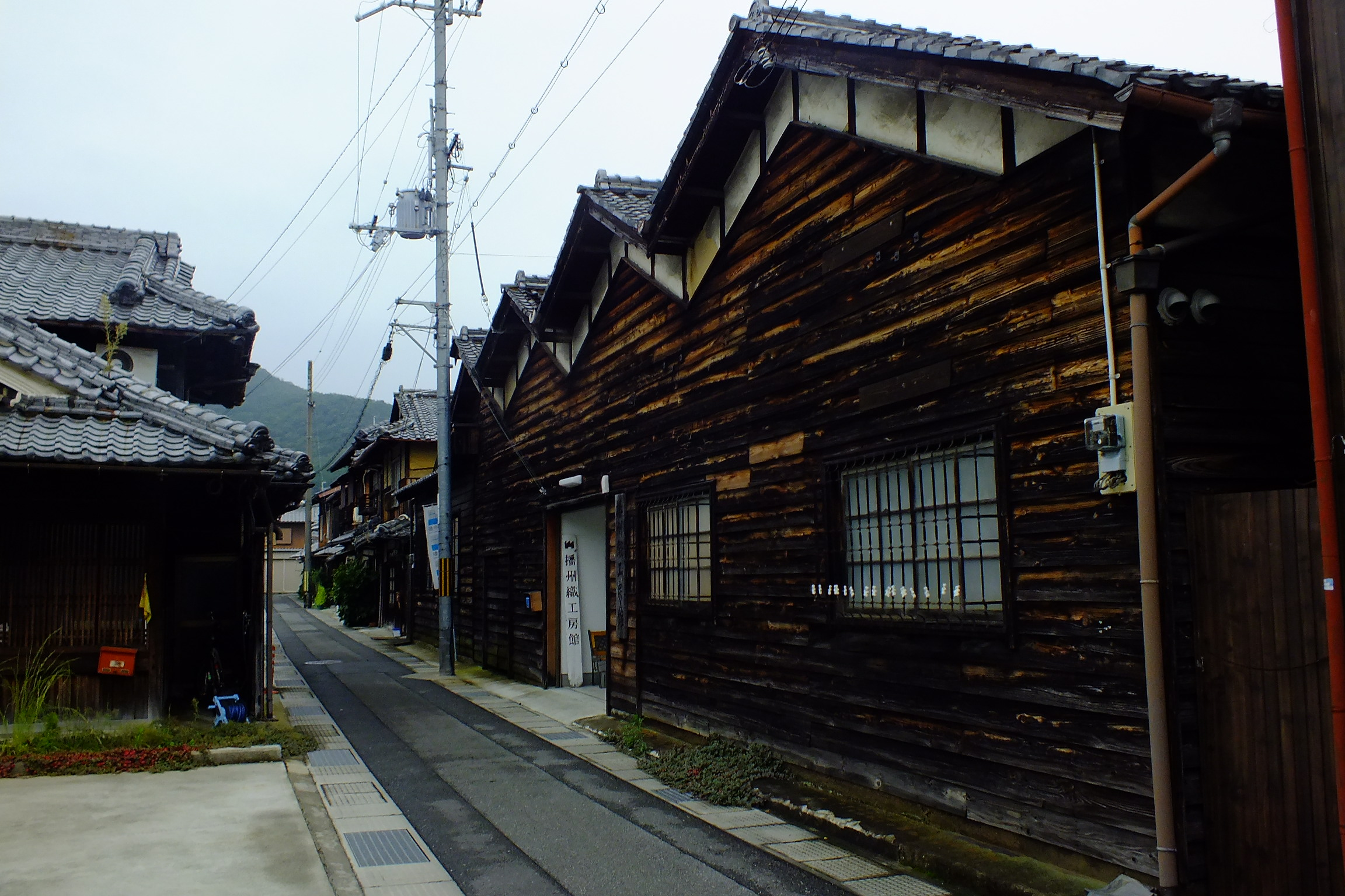 播州織工房館 〒677-0015 兵庫県西脇市西脇452-1 [地図] Tel/Fax. 0795-22-3775 【営業時間】 10時～17時 ※月曜定休日（祝日の場合は翌日）